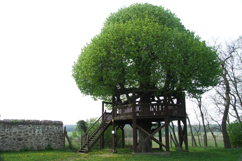 Tanzlinde in Galenbeck, Landkreis Mecklenburg-Strelitz, Mecklenburg-Vorpommern, Deutschland.